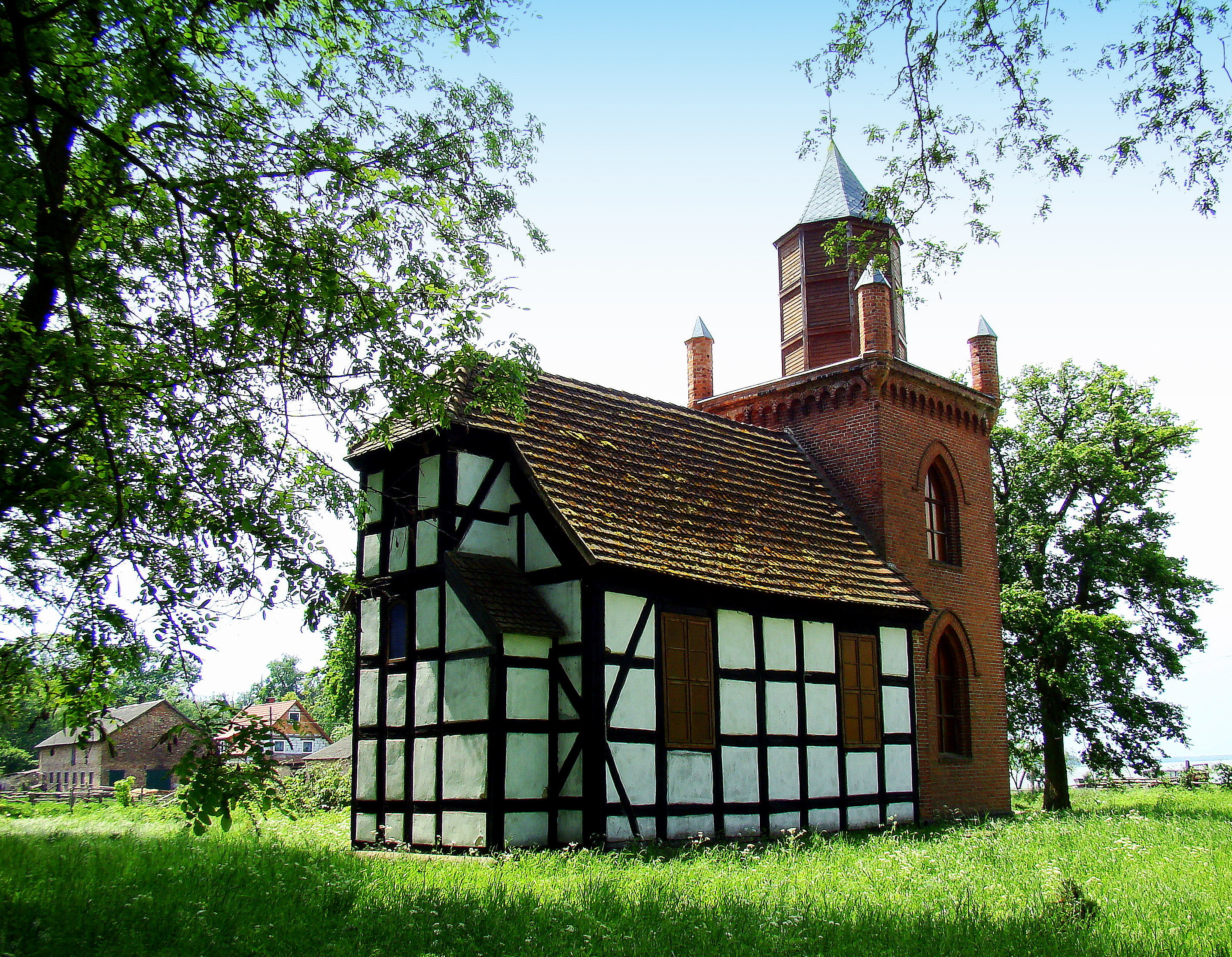 Kościół św. Huberta w Nowym Warpnie (Karszno), Polska